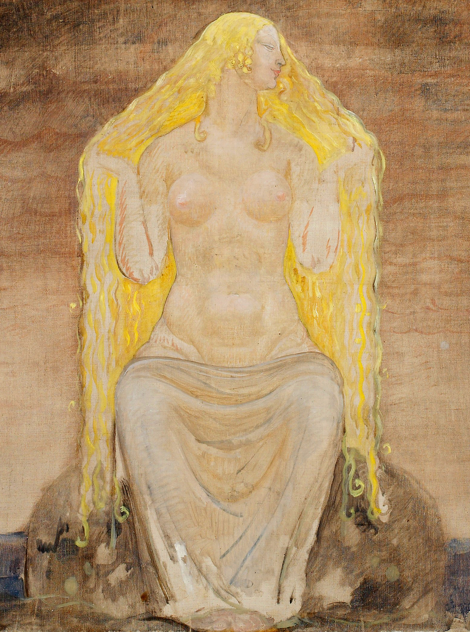 detail